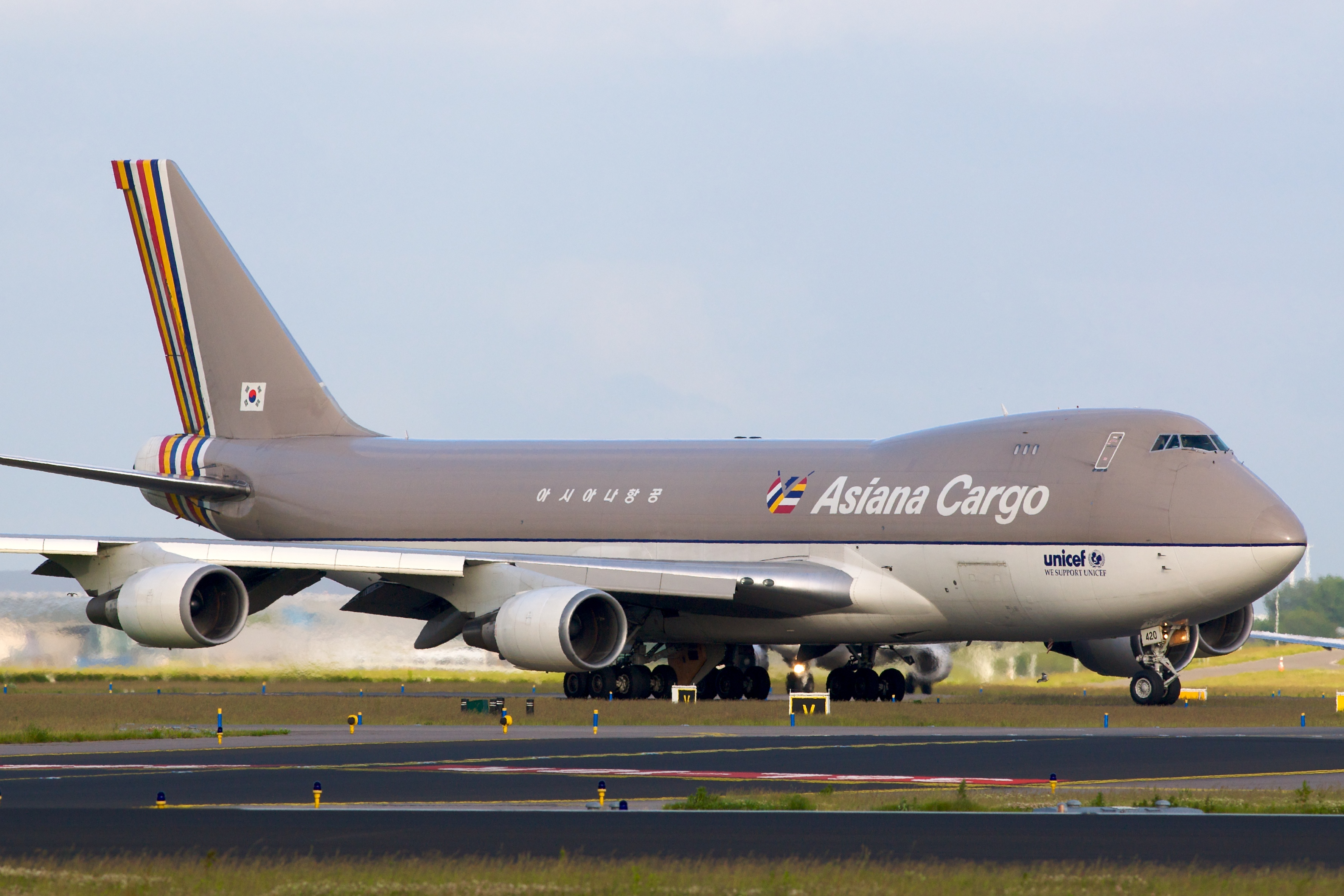 Asiana Cargo 747-400F HL7420.